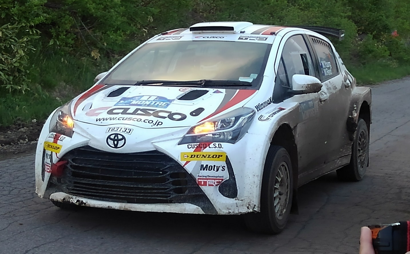 2019年ラリーモントレーに参戦するヴィッツ4WD